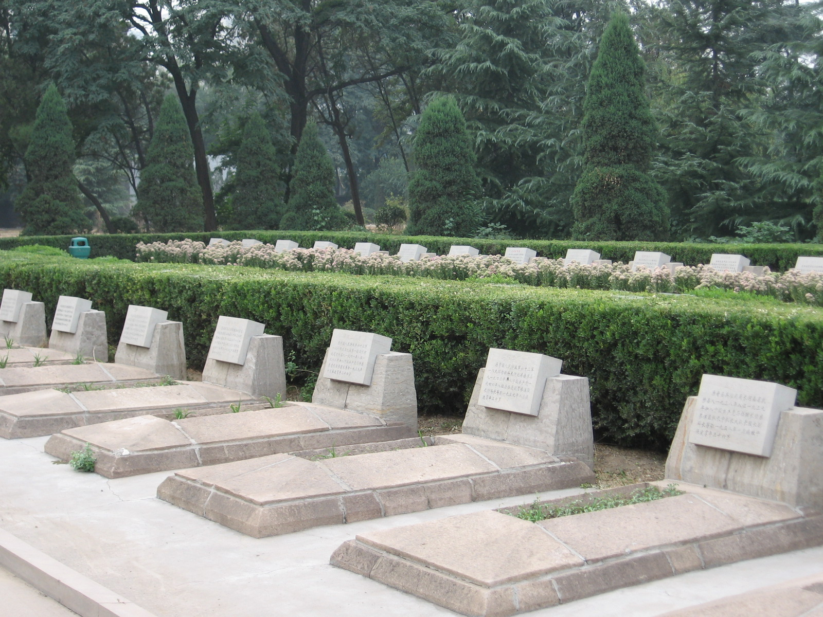 中国河北石家庄华北军区烈士陵园烈士墓群。